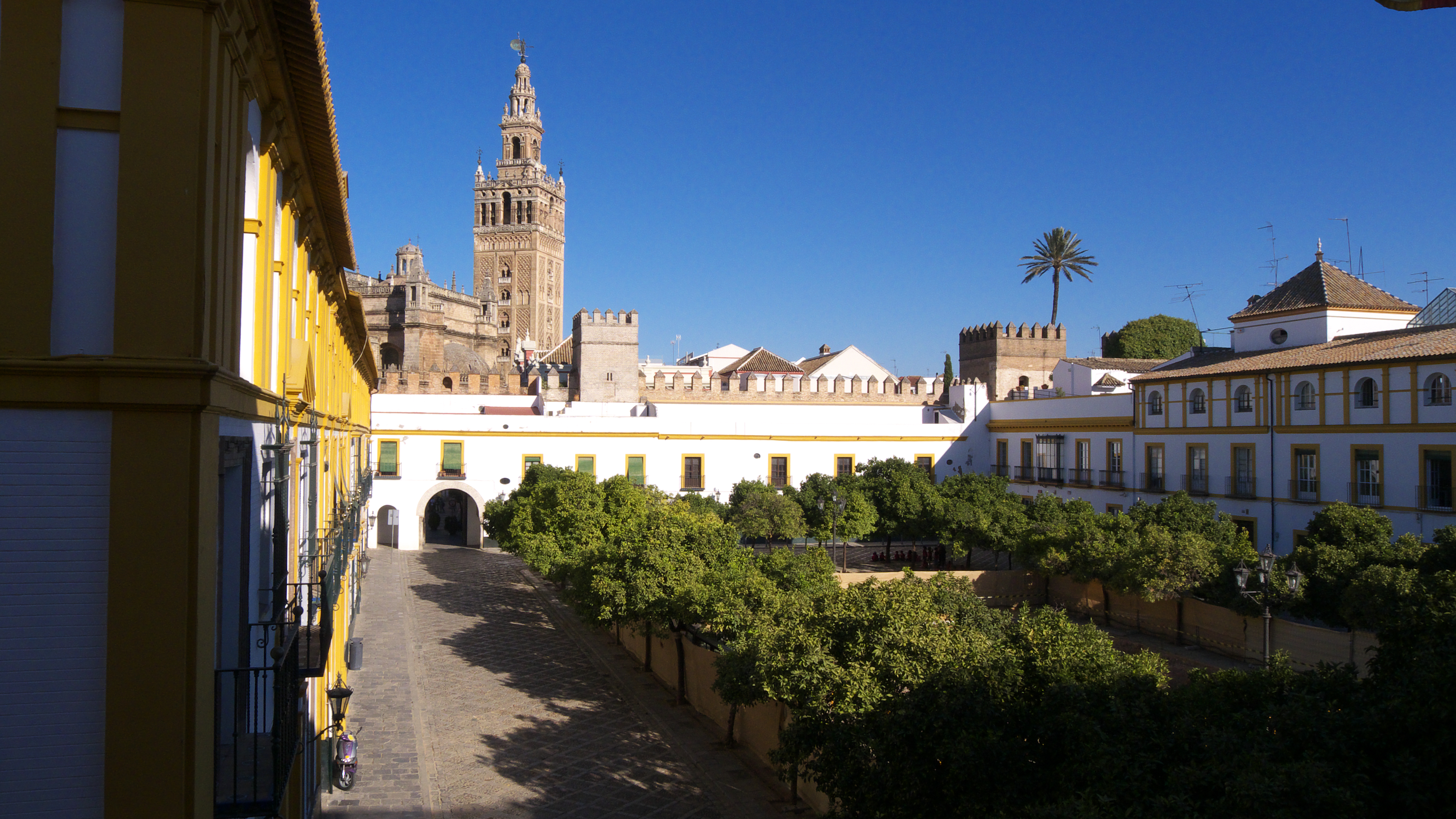 En su zona central, intervenciones arqueológicas.